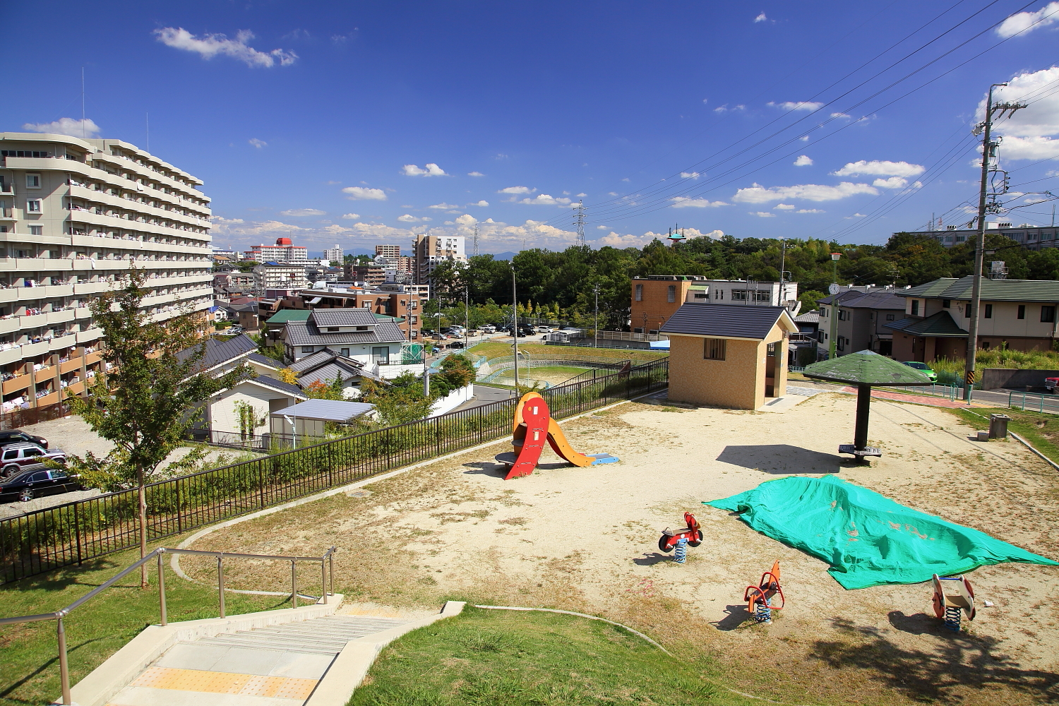 有松武路公園（名古屋市緑区武路町、2012年（平成24年）10月）